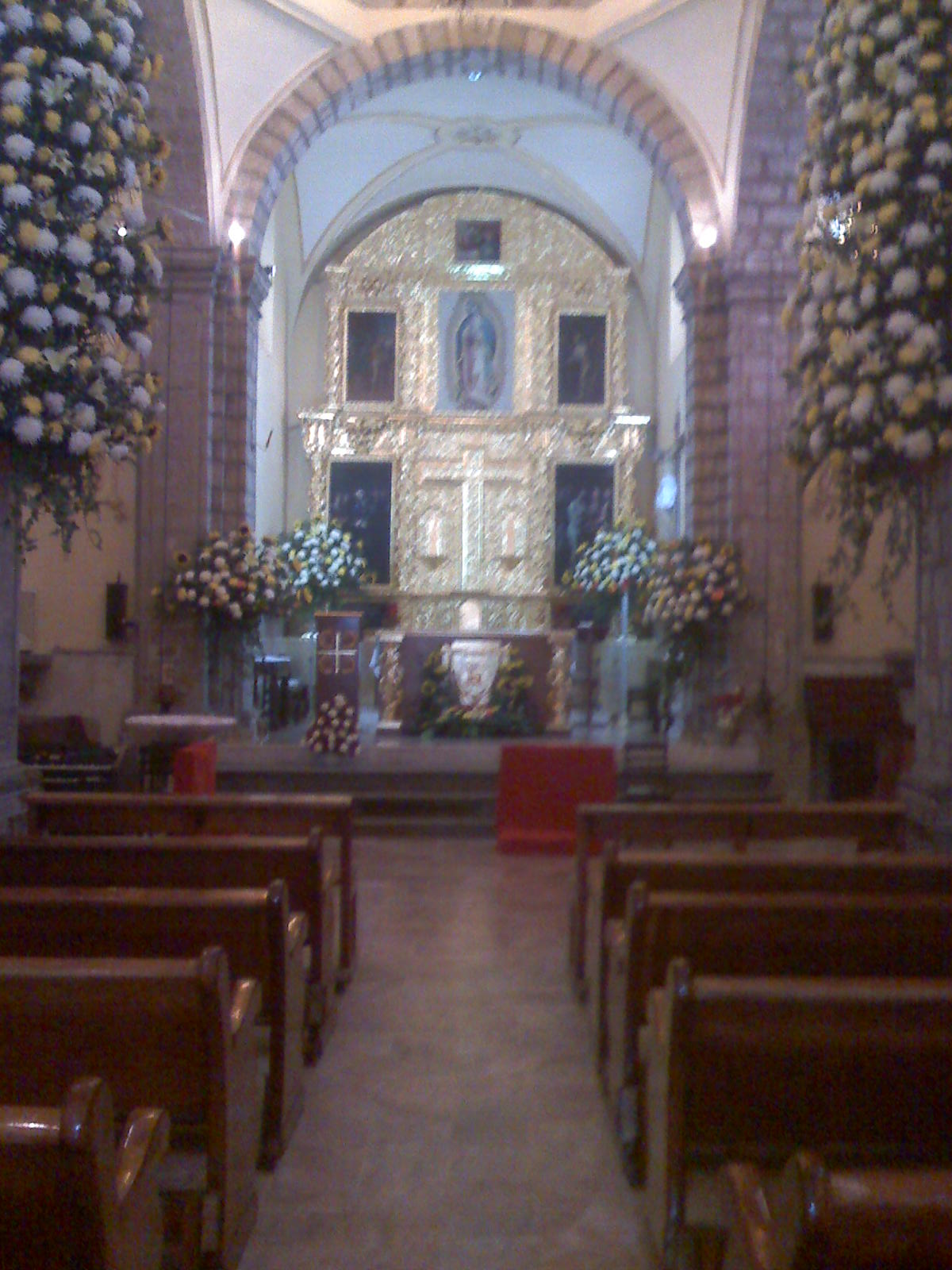 ninguna